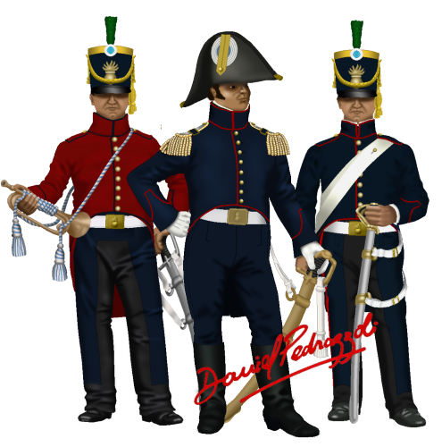 Unifoeme de tropeta, oficial y granadero - 1816